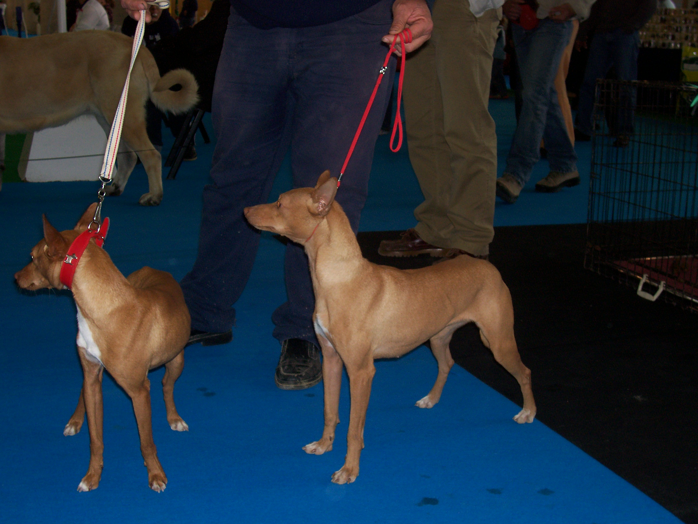 Pareja de Podencos andaluces talla chica y pelo corto en la exposición de Jerez de la Ftra